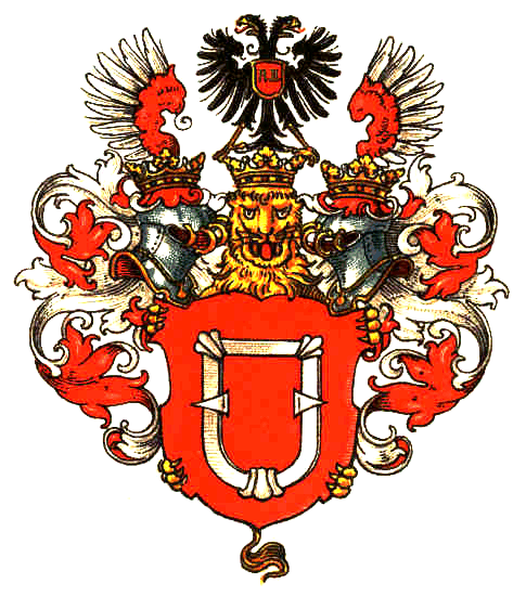 Wappen der Familie von Zedlitz und Neukirch.